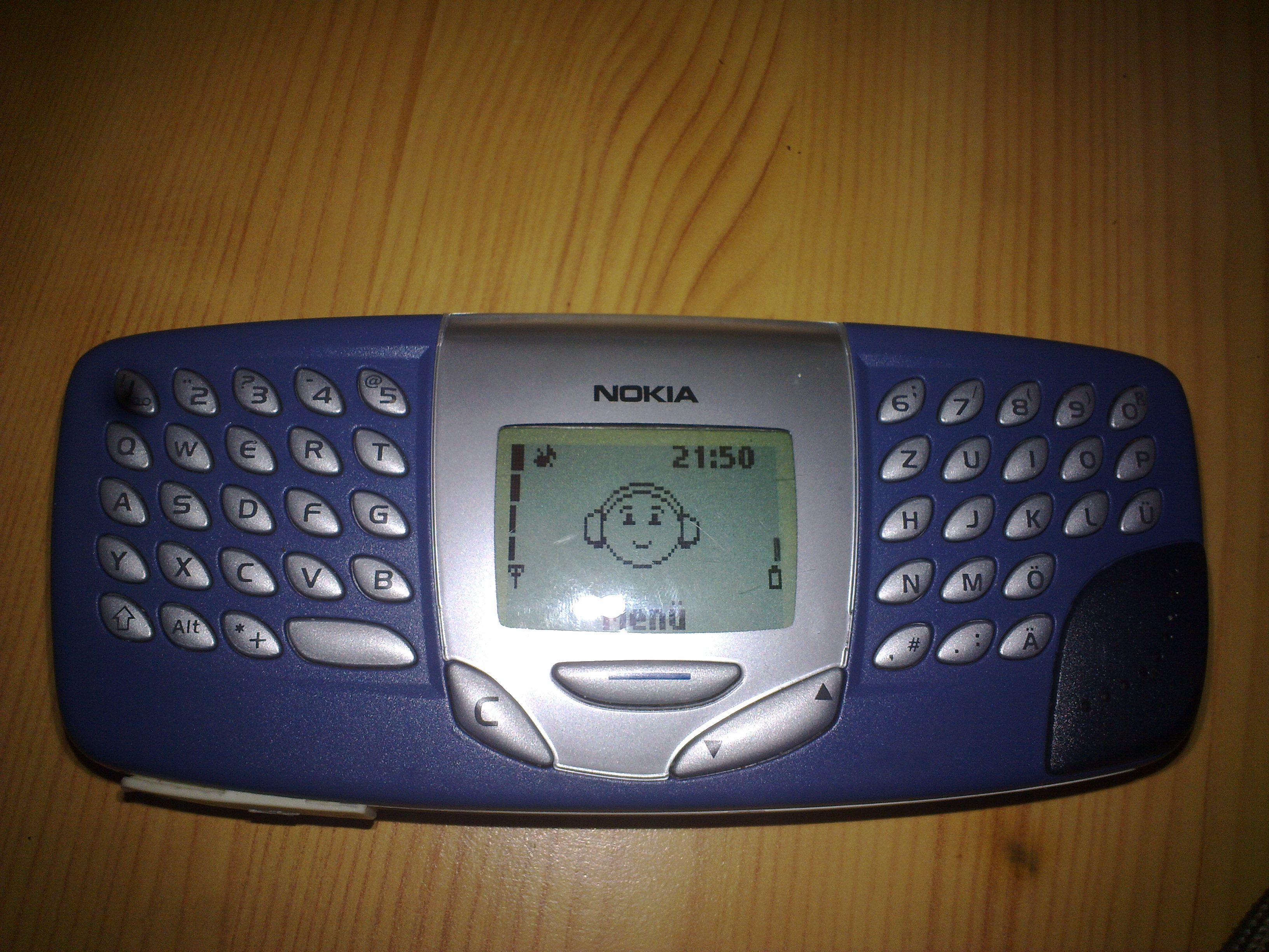 Nokia 5510 mit blauem Frontcover und Lautlos-Smiley